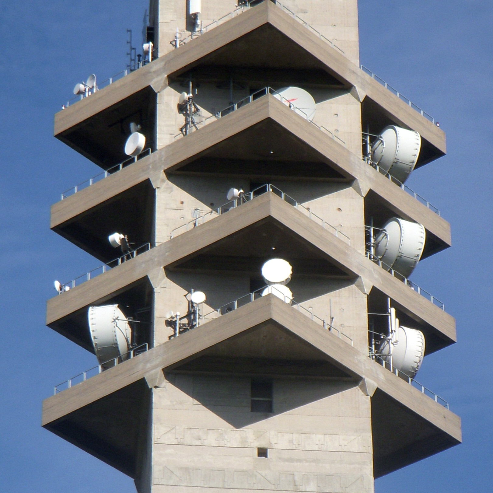 Kaknästornet i Stockholm, antennplattformar